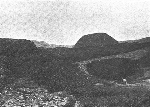 Mission Foureau-Lamy: Mont en dôme, près d’Aoudéras.